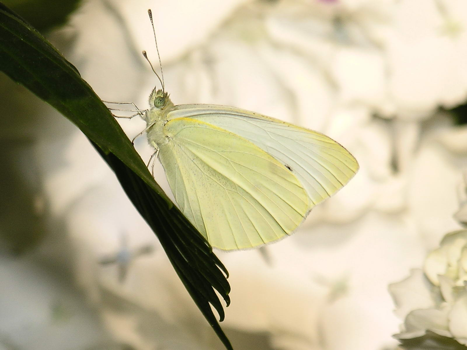 Foto tirada cunha Nikon E8800. Self made